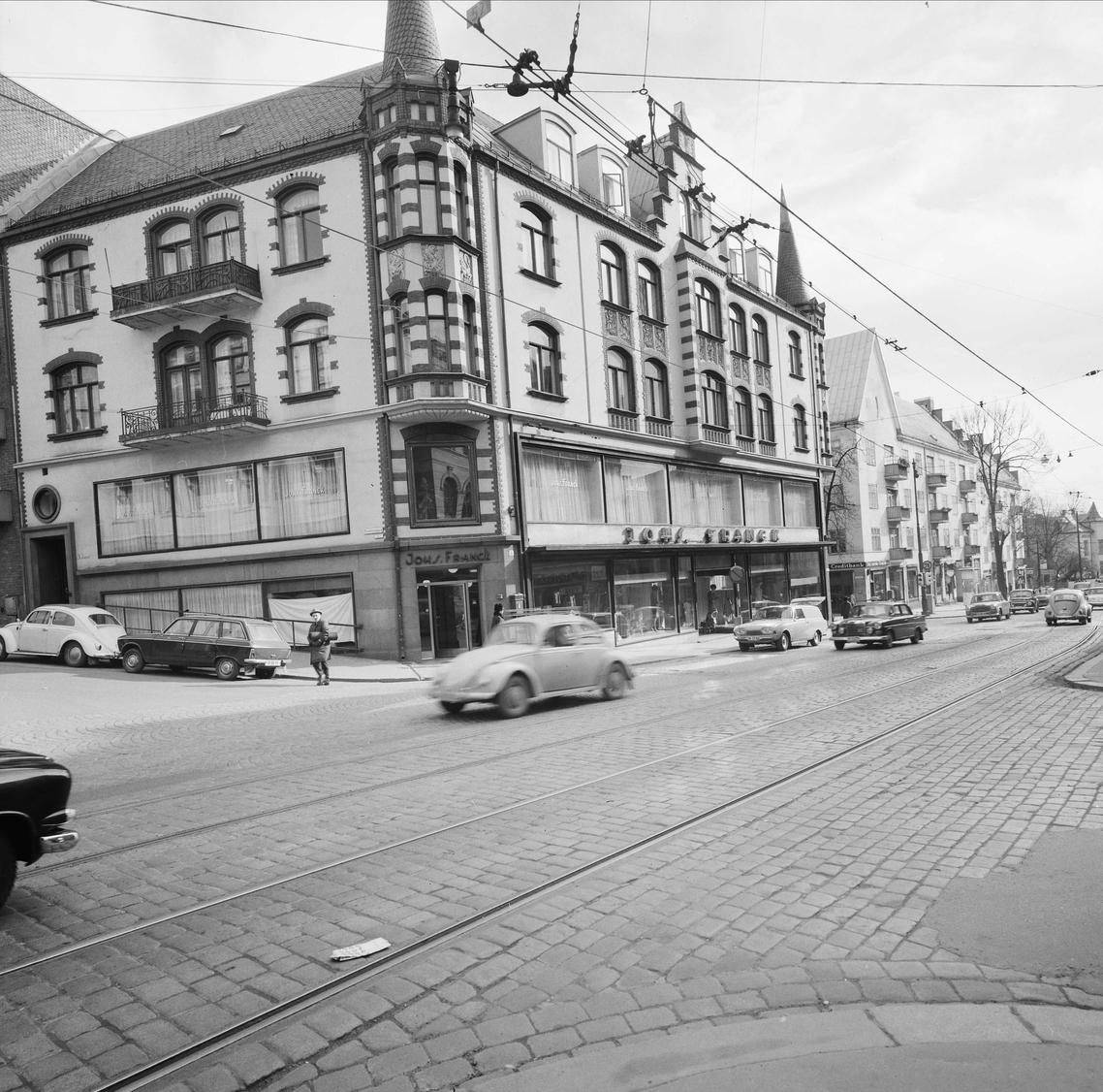 Bogstadveien 11 (t.v.) og 3–5 (t.h., litt i bakgrunnen). Sistnevntes fasade er noe endret siden dette bildet ble tatt av Knut Eng i 1967. Fra Byhistorisk samling hos Oslo Museum.